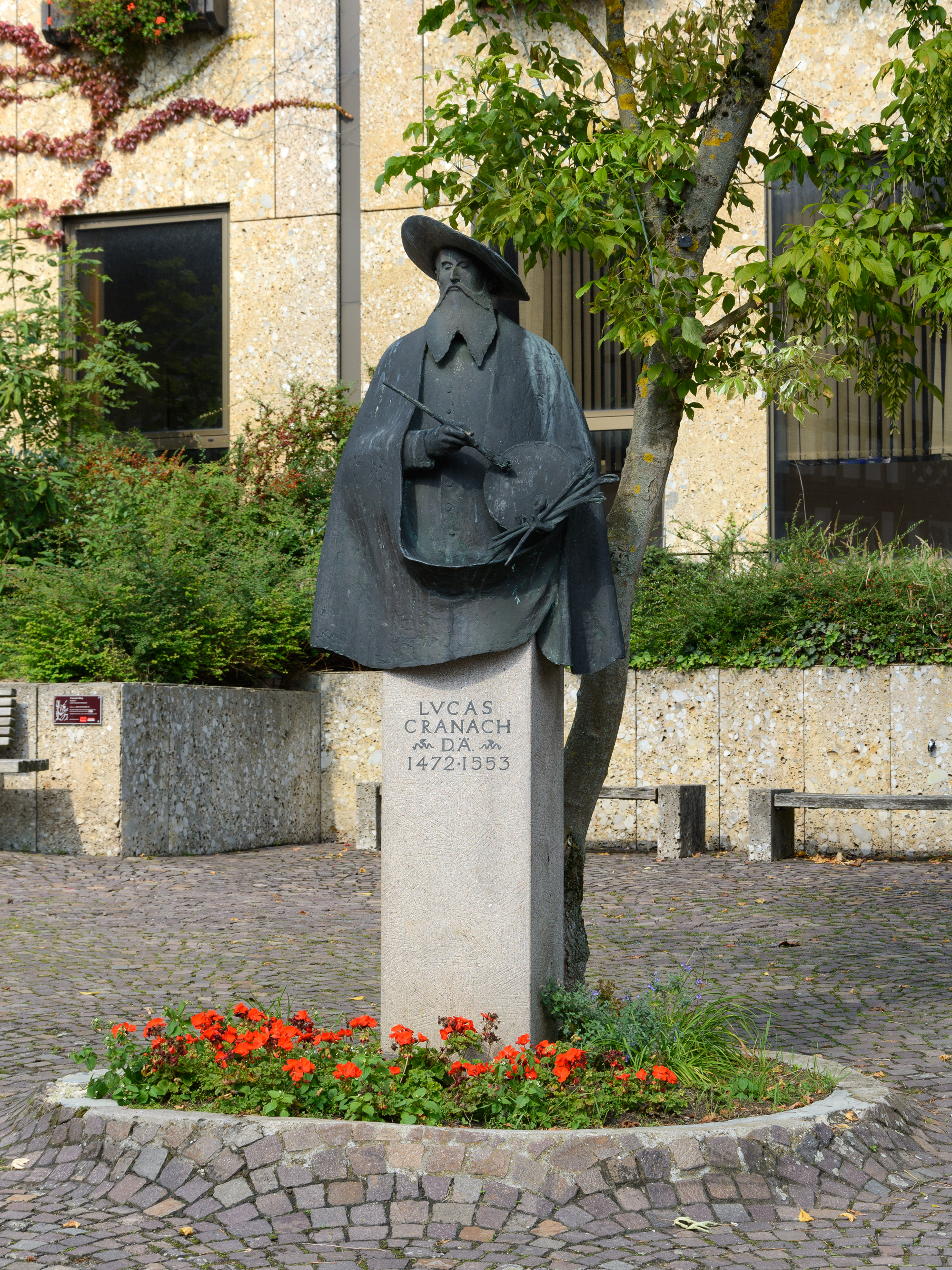 Denkmal für Lucas Cranach d. Ä. auf dem Marktplatz vor dem neuen Rathaus in Kronach.